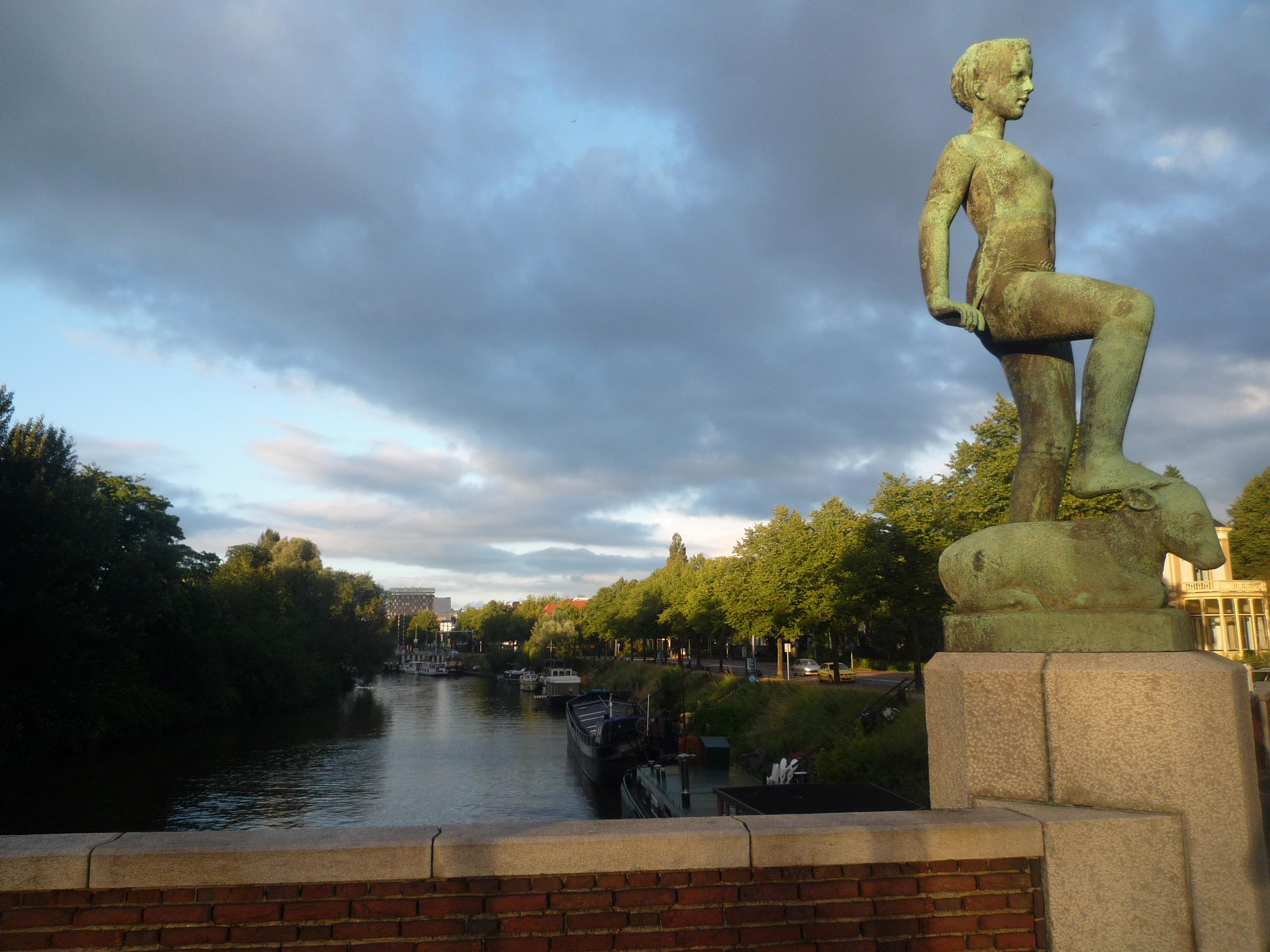 Landbouw en Veeteelt, Wladimir de Vries, 1953 In de volksmond Blote Bet